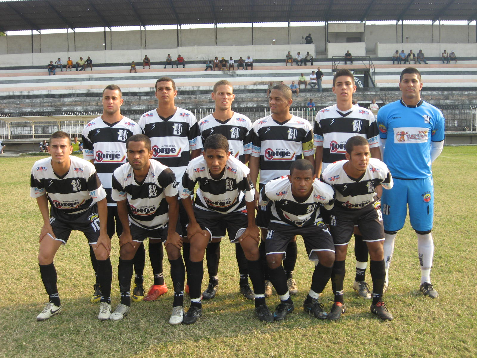 Equipe profissional do Campo Grande em 2010.